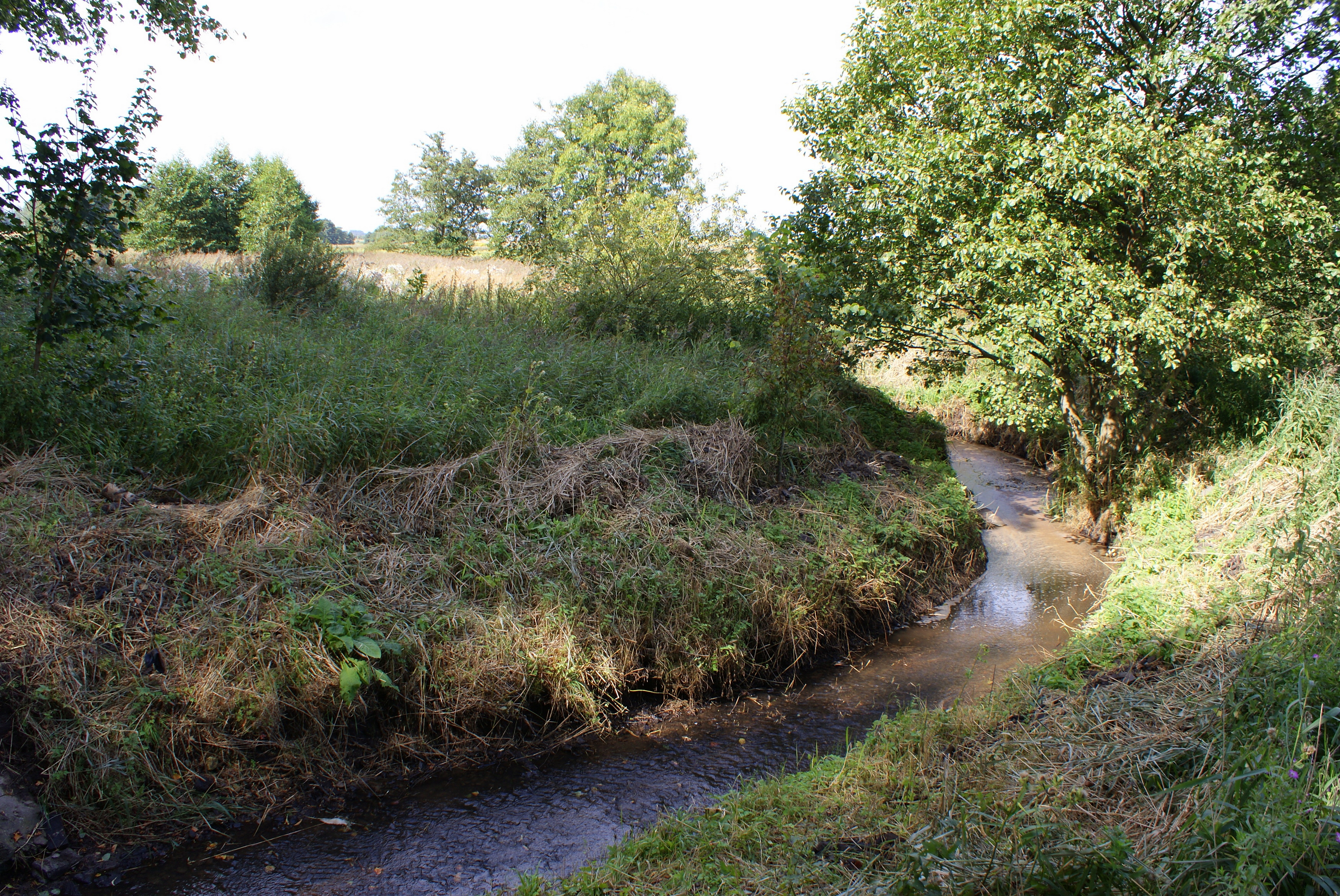 Sekwanka na północ od drogi wojewódzkiej nr 102 (przy mostku)